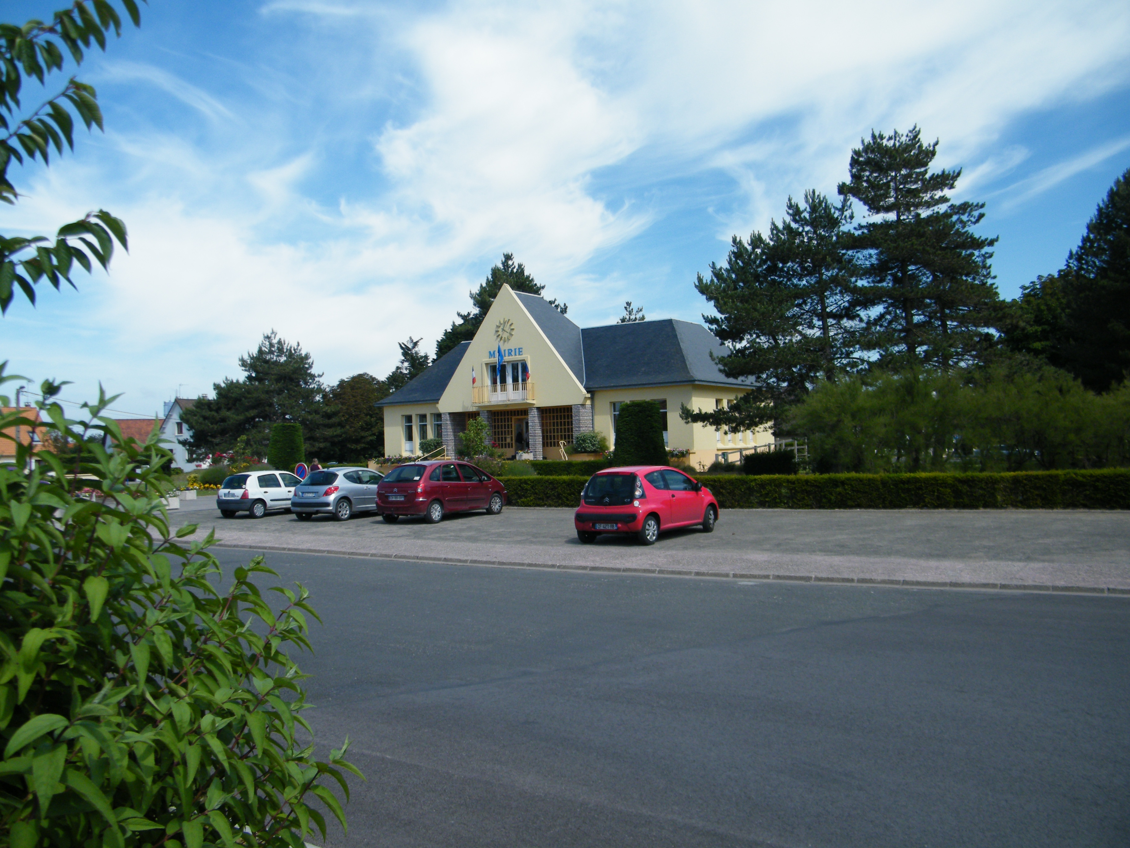 Fort-Mahon-Mairie